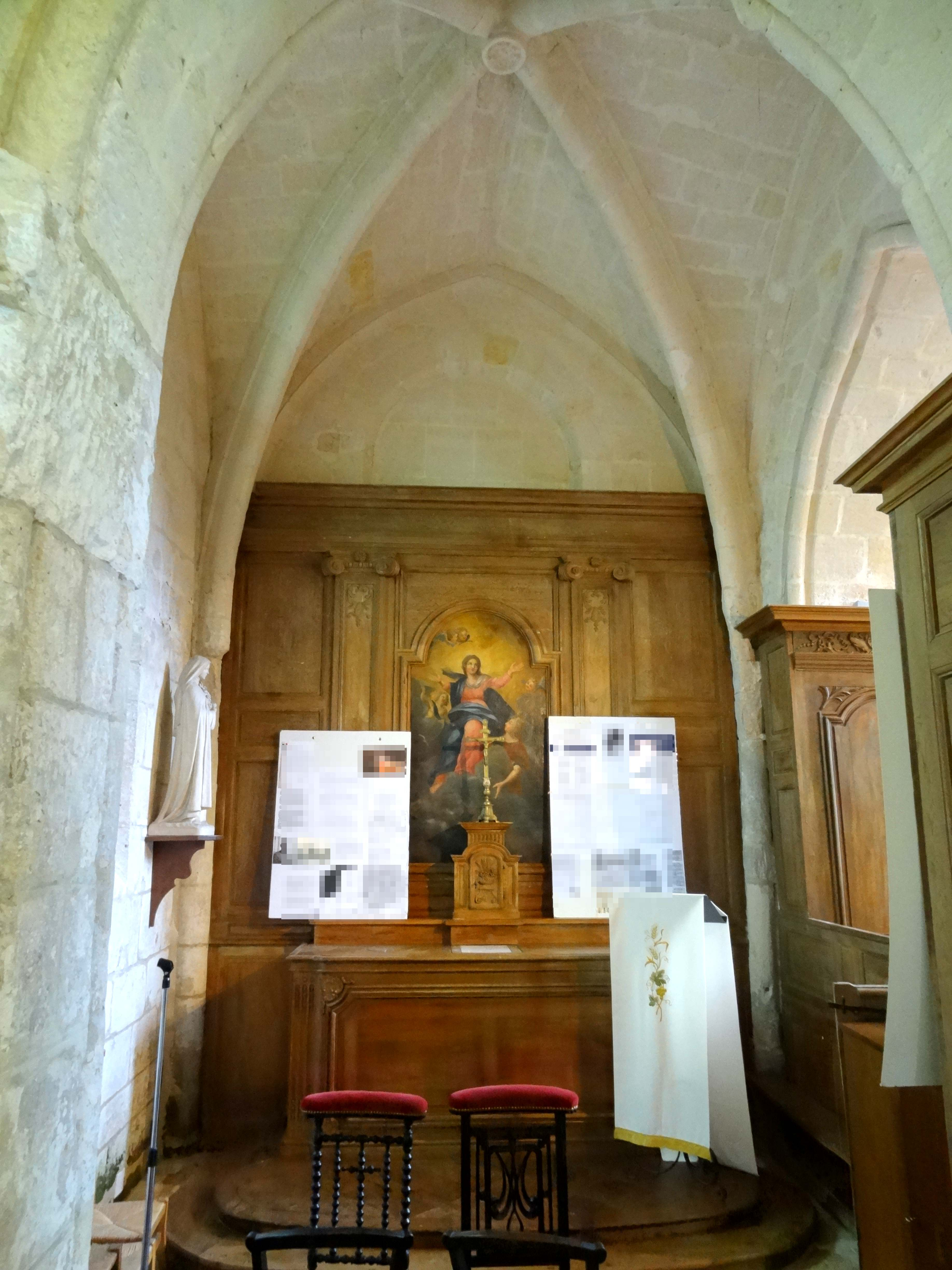 Intérieur de l'église - voir titre.